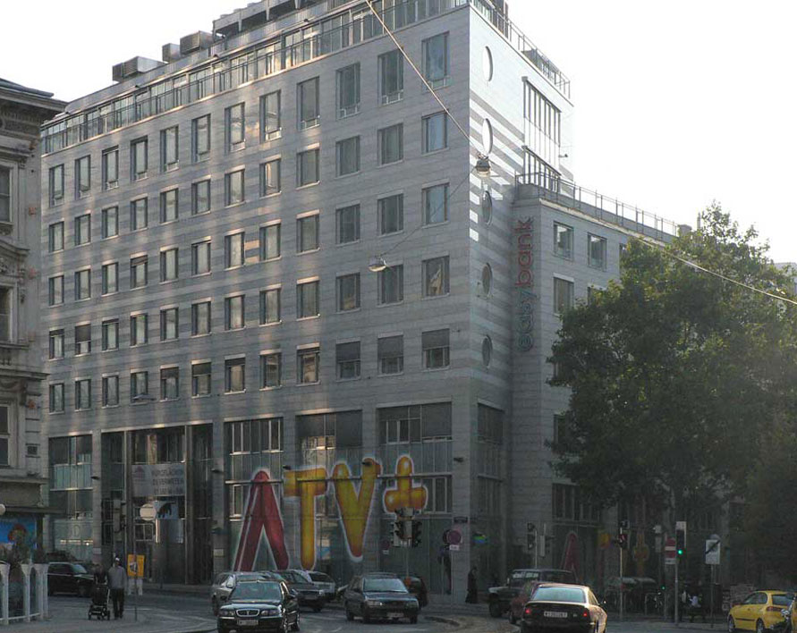 ATVplus-Haus in Wien-Leopoldstadt.